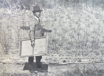 1936年撮影（当時36歳/撮影者不明）